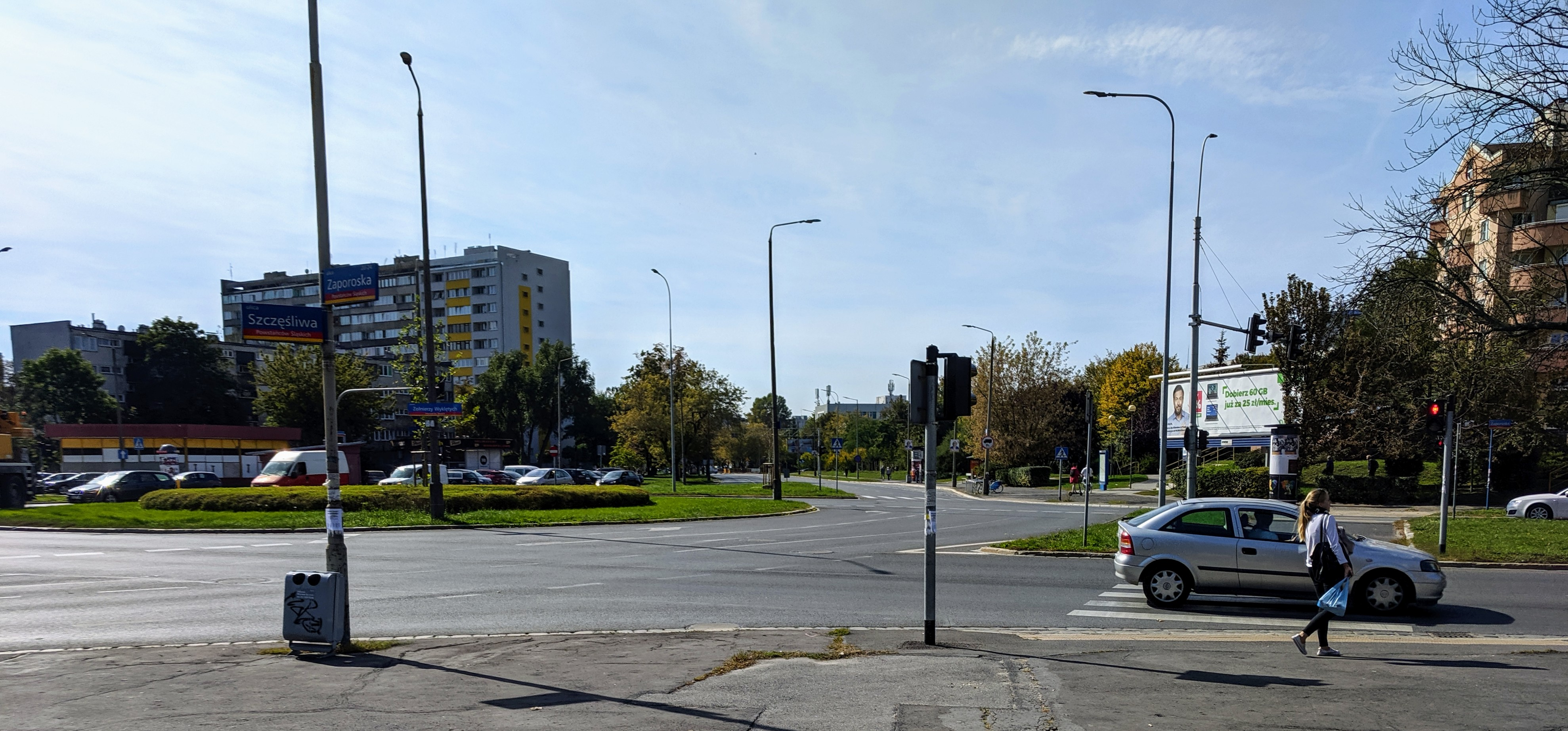 Skrzyżowanie ulic: Gajowickiej (w perspektywie na wprost), Szczęśliwej (w lewo, nieco w tył) i Zaporoskiej (w prawo i poza kadrem w lewo) oraz Ronda Żołnierzy Wyklętych we Wrocławiu (pośrodku). W środku w oddali widoczna wieża kościoła św. Karola Boromeusza